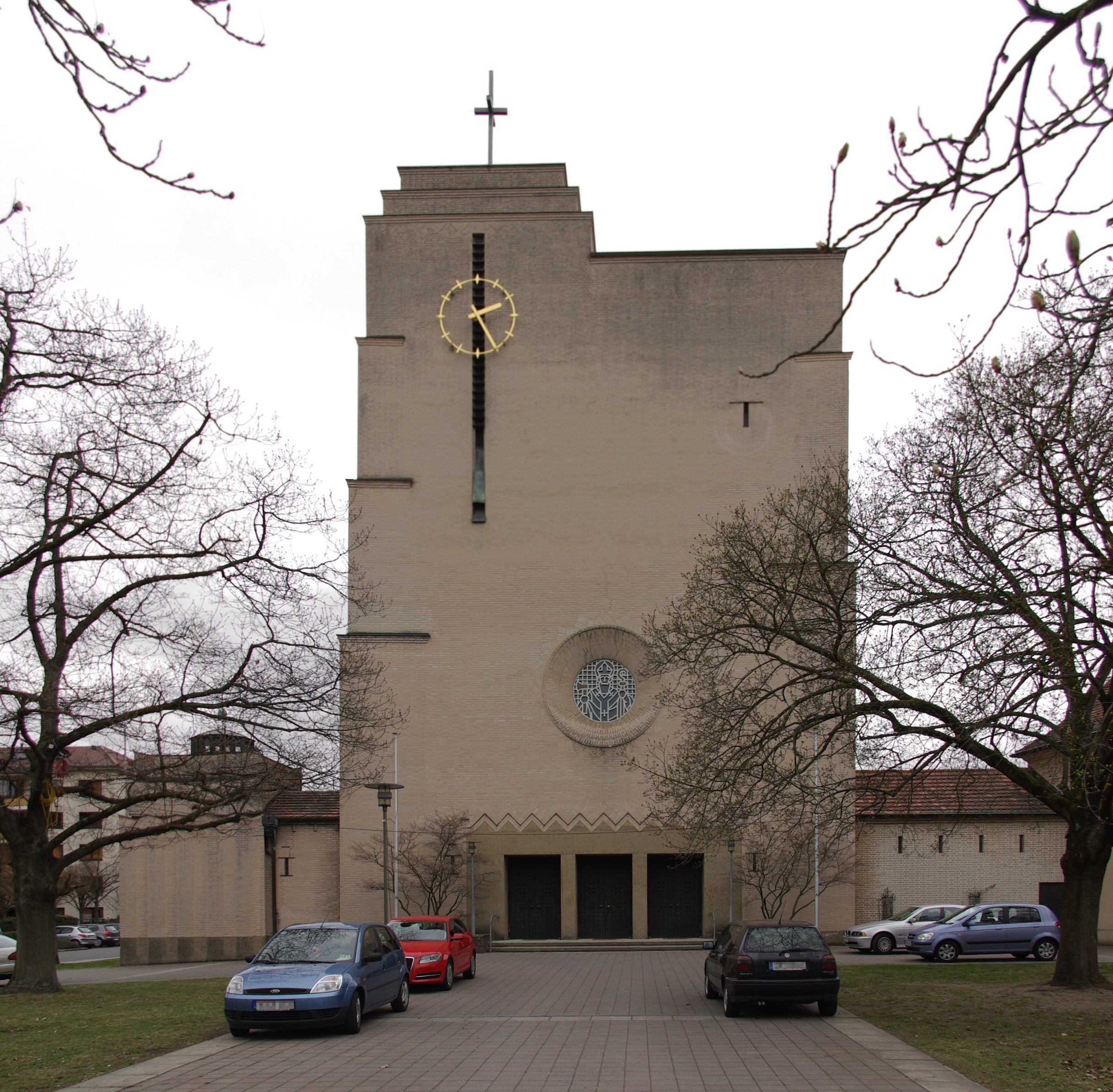 Die 1928 geweihte Pfarrkirche St. Bonifaz in Erlangen. Der Architekt Fritz Fuchsenberger ging völlig von der Planung im neubarocken Heimatschutzstil ab und gestaltete die Kirche letztlich im expressionistischen Stil, mit Anklängen an frühchristliche und romanische Bauten. 1927 wurde der Bau begonnen, am 10. Juni 1928 wurde die Kirche durch den Bamberger Erzbischof Johann Jakob von Hauck geweiht.